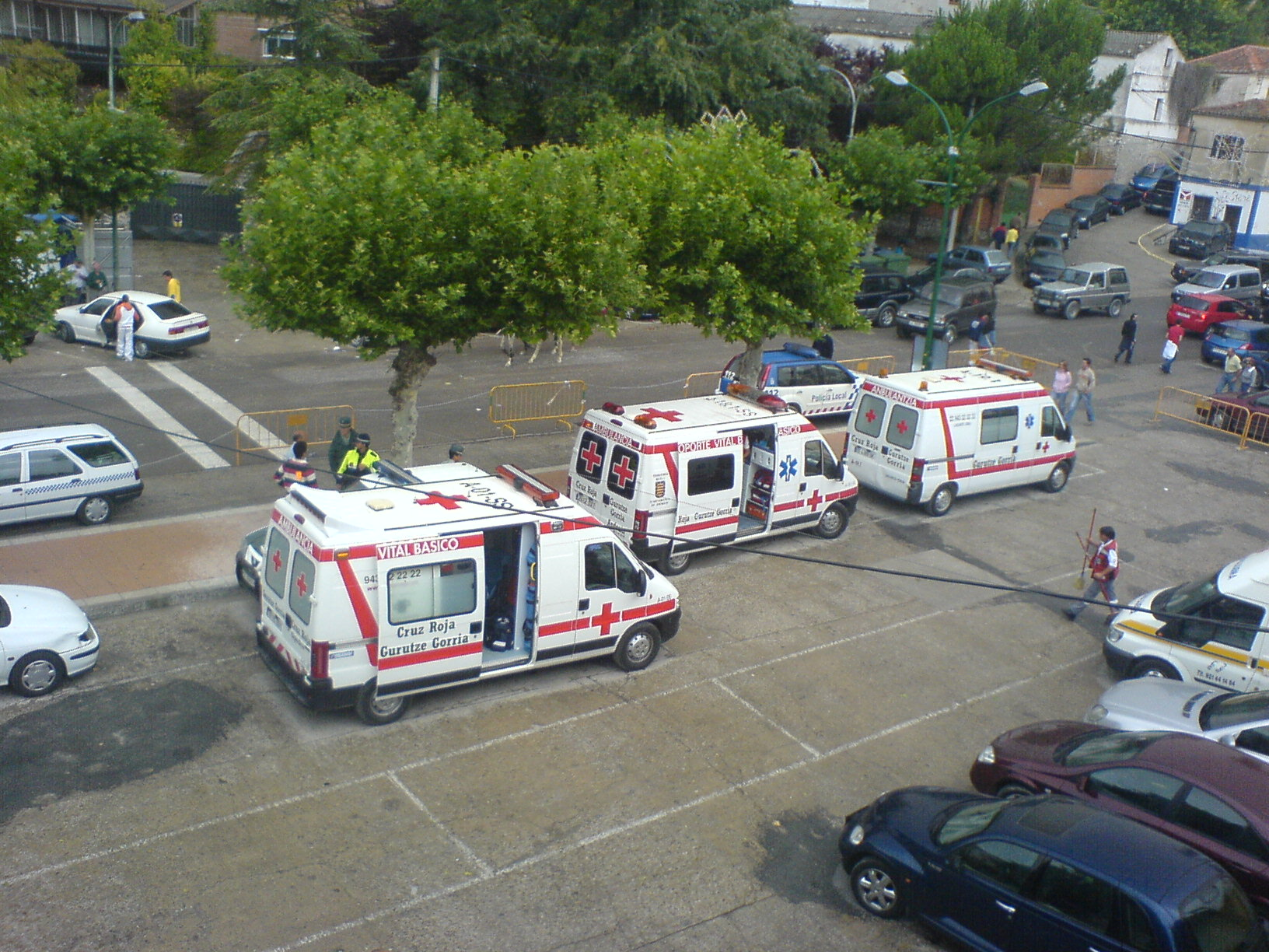 Ambulancias preparadas ante una posible emergencia en Cuéllar